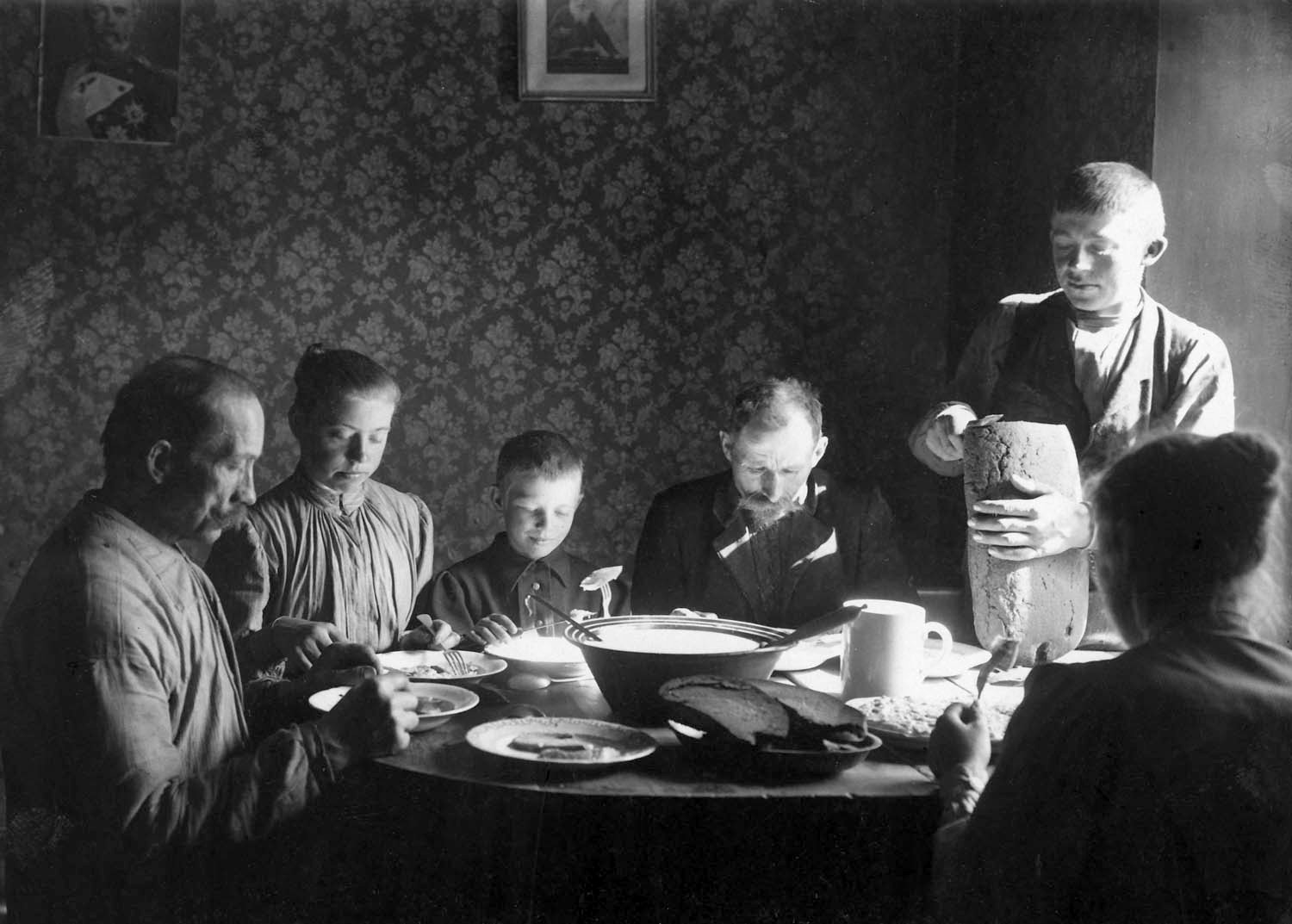 Middagsmåltid i folkstugan. Oxie härad, Västra Klagstorps socken, Skåne.